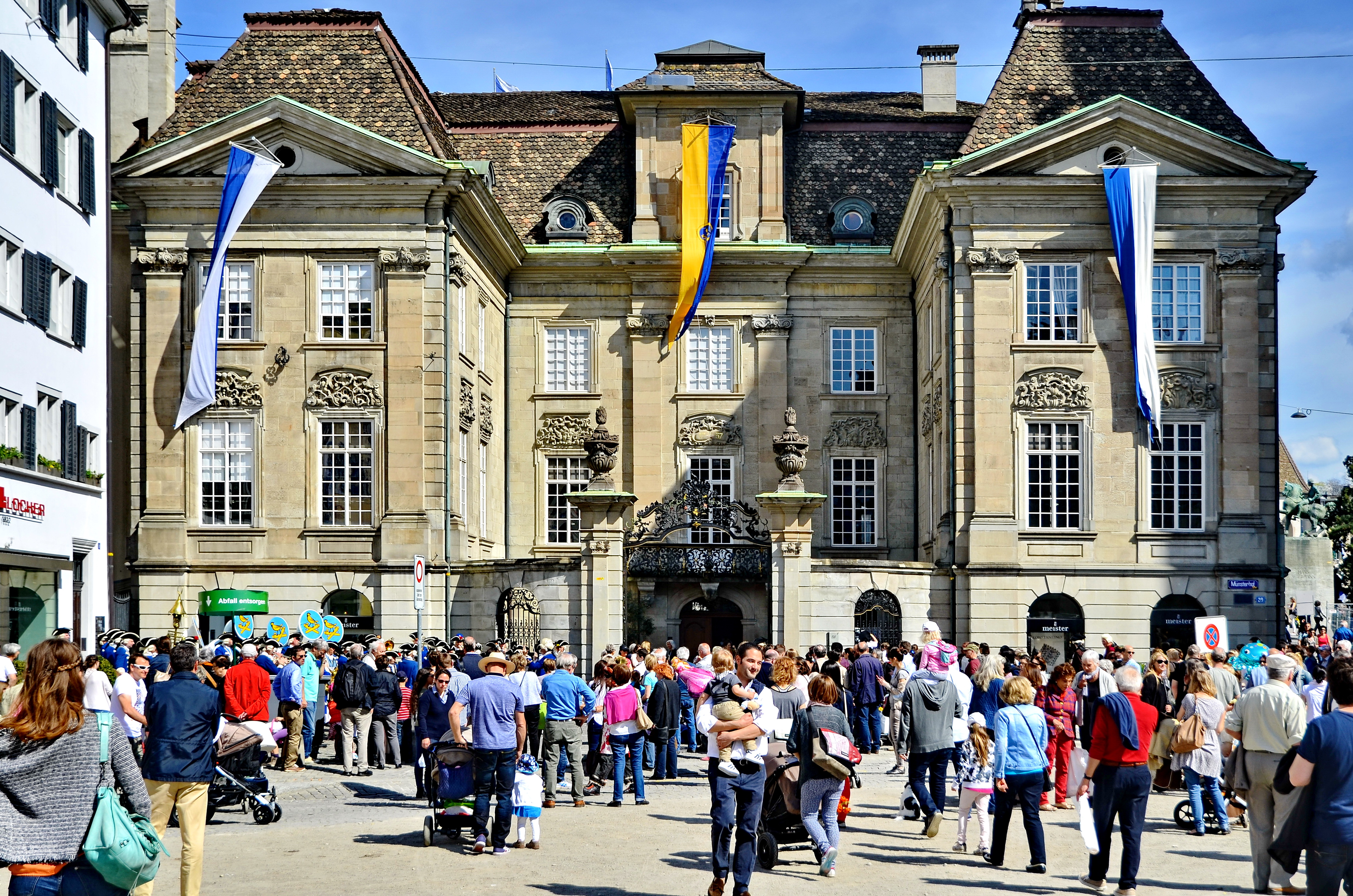 Sechseläuten 2015 : Zunfthaus zur Meisen at Münsterhof in Zürich (Switzerland)